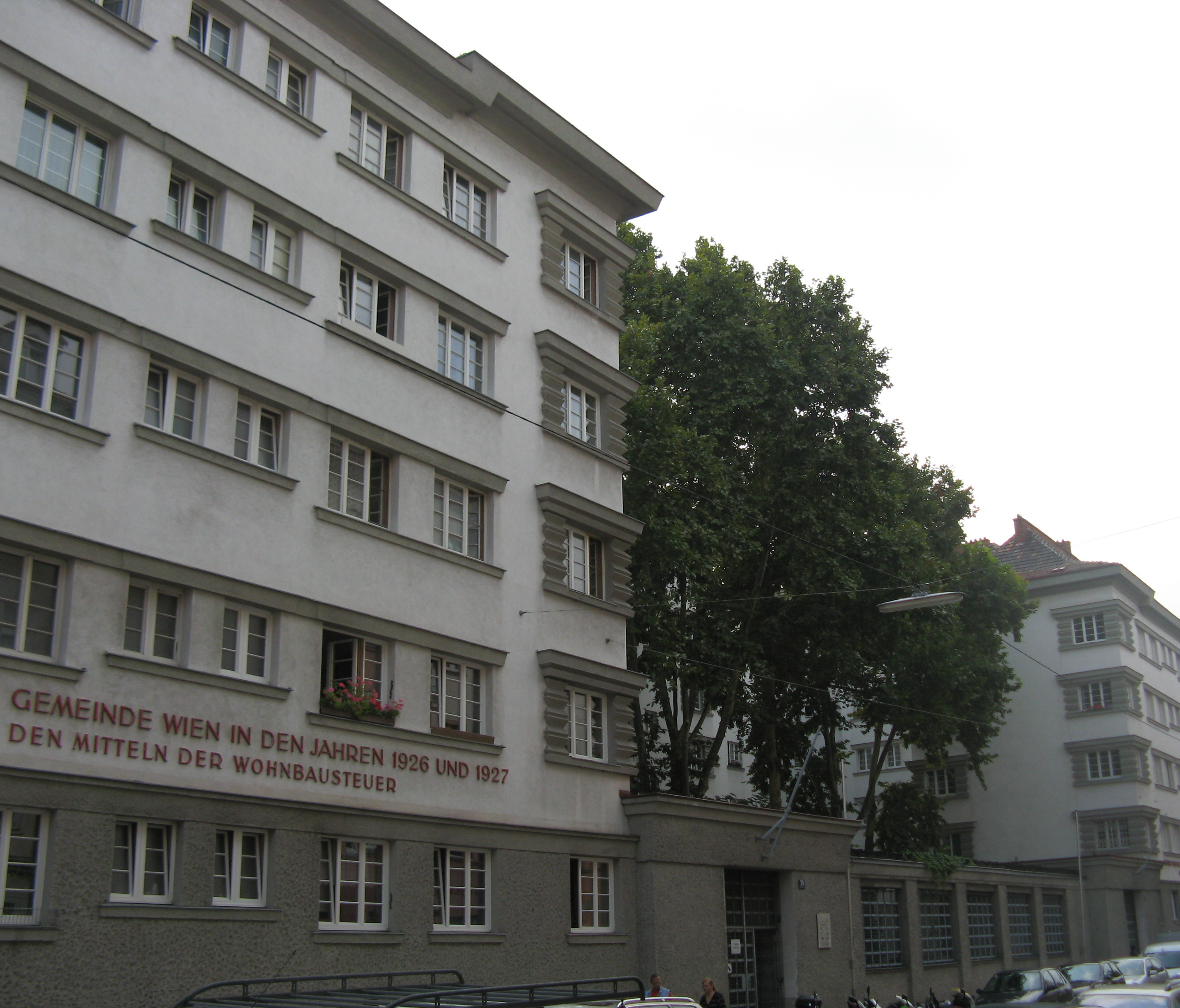 Städtische Wohnhausanlage (1926) von Georg Rupprecht, Hasengasse 35-37, Wien-Favoriten